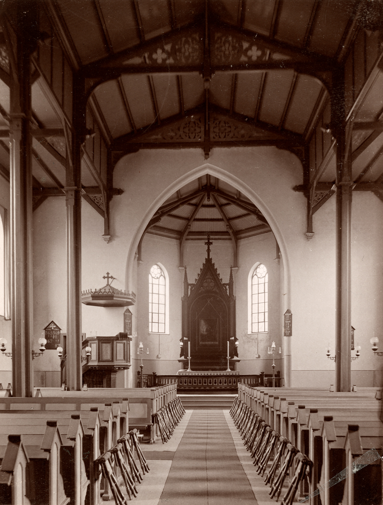 Interiør i Barbu kirke. Foto: Christian Christensen Thomhav, fra Kulturminnebilder.no.